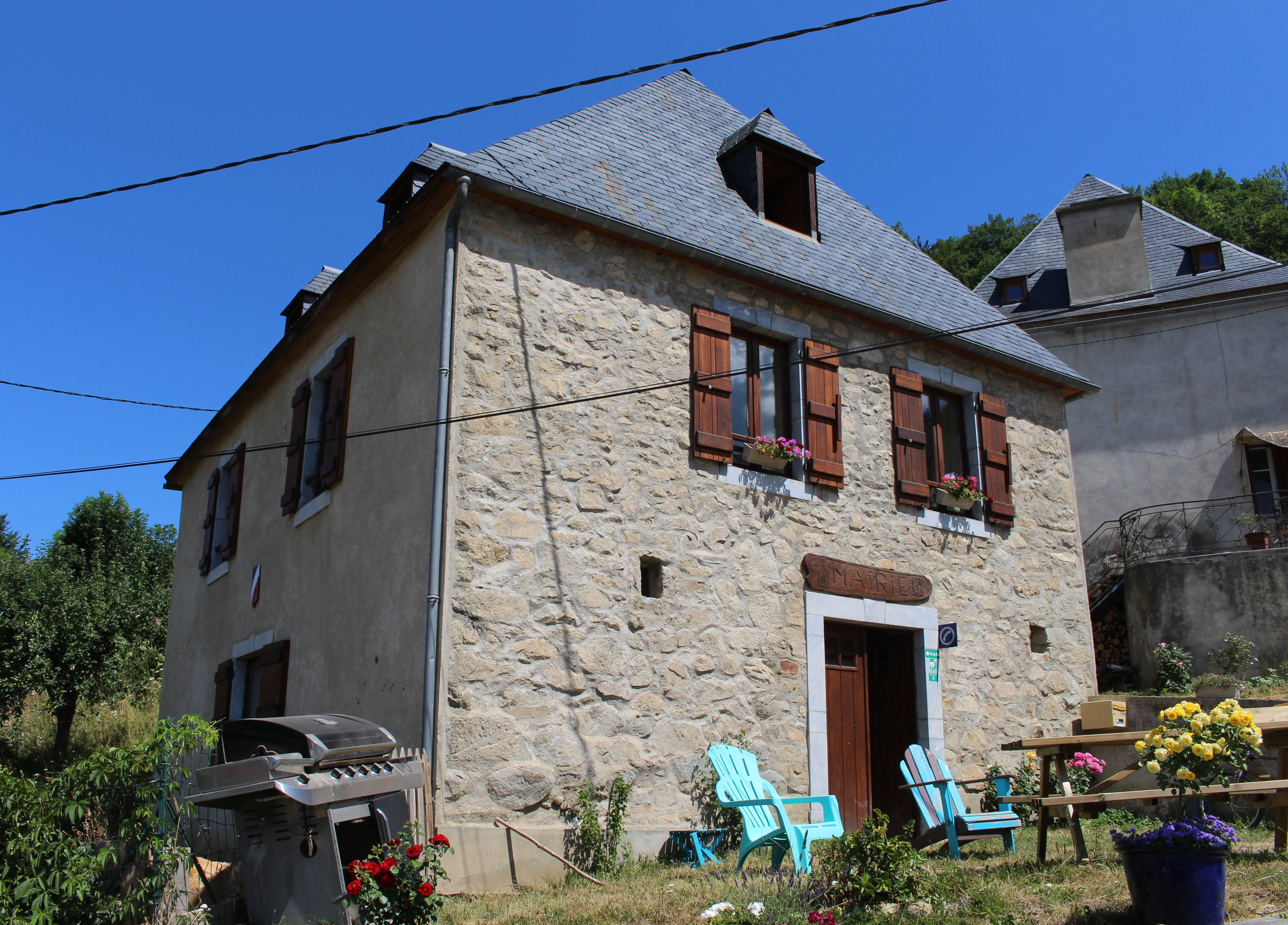 Mairie de Ris (Hautes-Pyrénées)